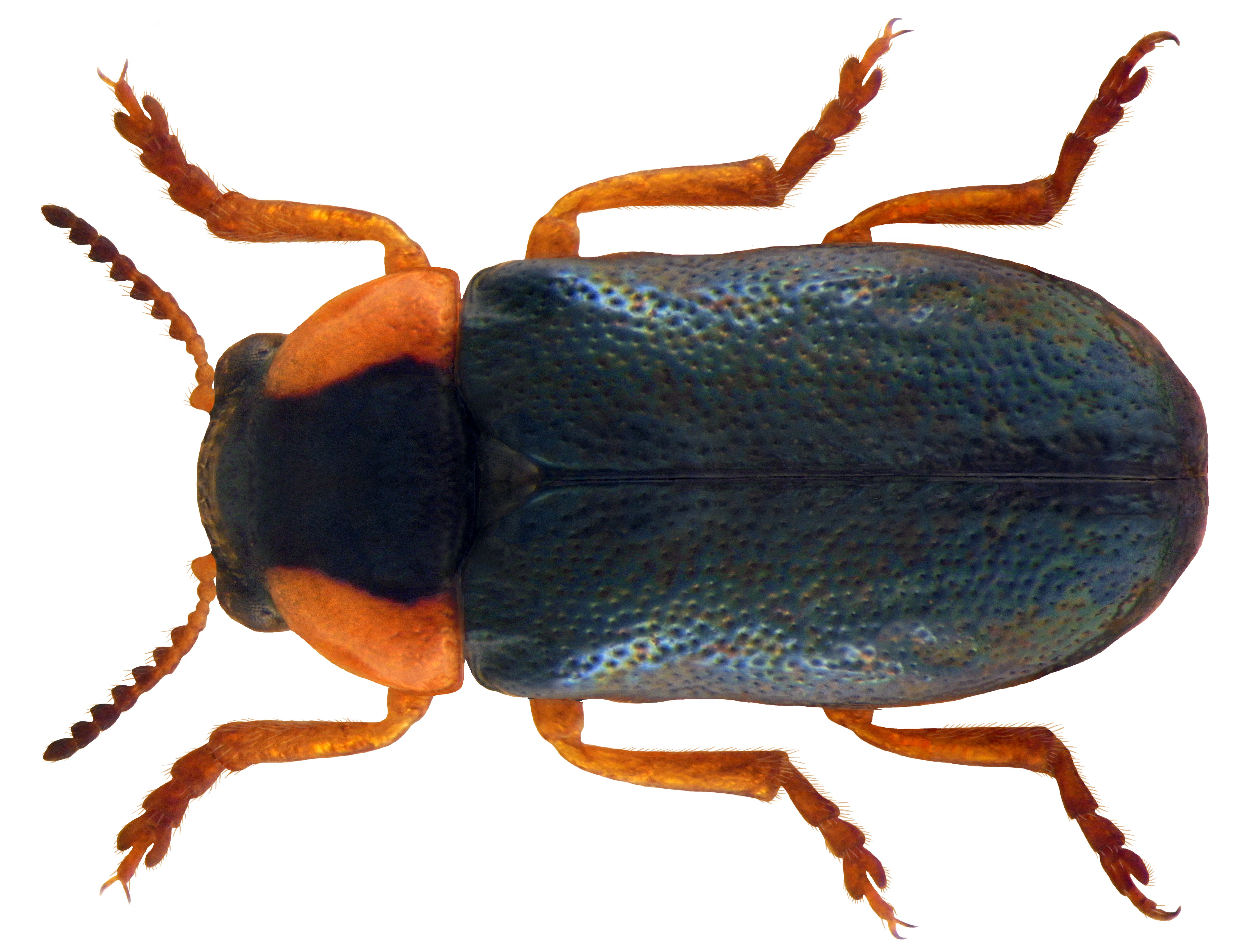 Smaragdina affinis (Illiger, 1794) Familie: Chrysomelidae Groesse: 2,5-4 mm Verbreitung: Mittel- und Südeuropa Ökologie: besonders an Coryllus avellana, Quercus, Crataegus Fundort: Germania, Bayern, Oberfranken, Wonsees leg.det. U.Schmidt, 1972 Photo: U.Schmidt, 2010